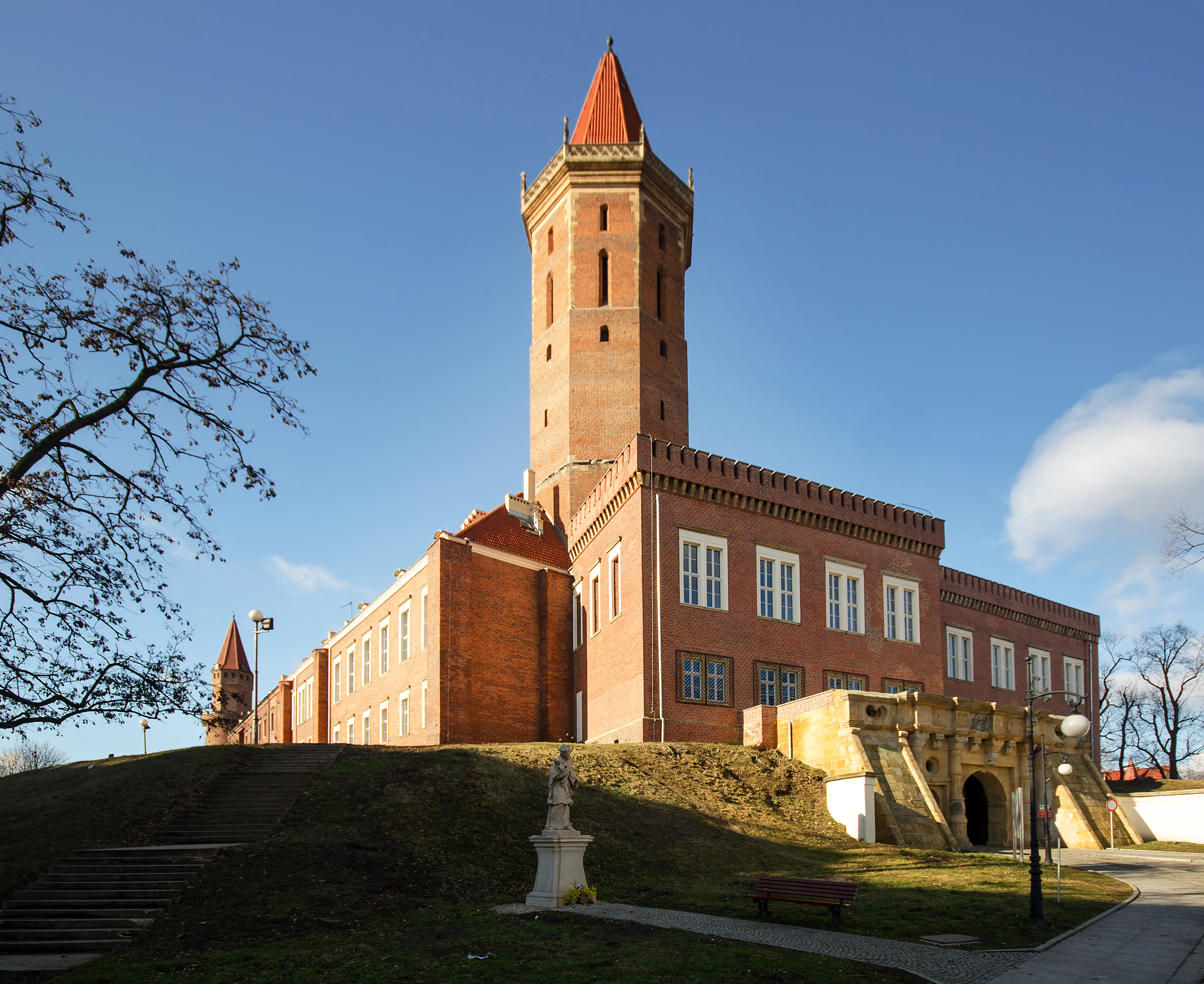 Legnica, zamek piastowski, XIII, XIX